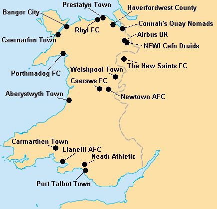 Répartition en Welsh Premier League 2008-2009.